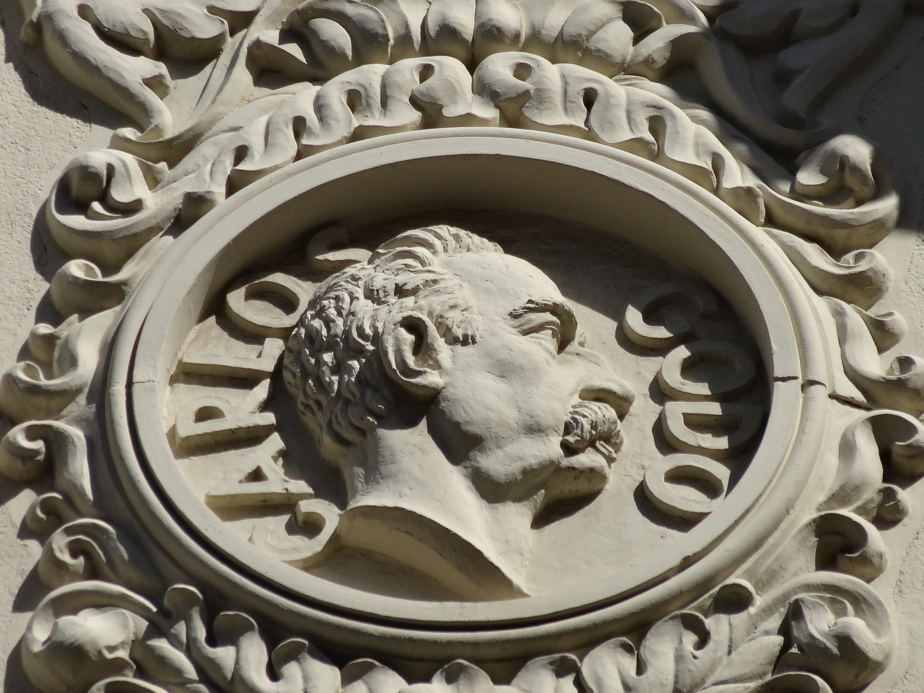 Carles Godó. El medallons de La Vanguardia. C. de Tallers, 62 (Barcelona)